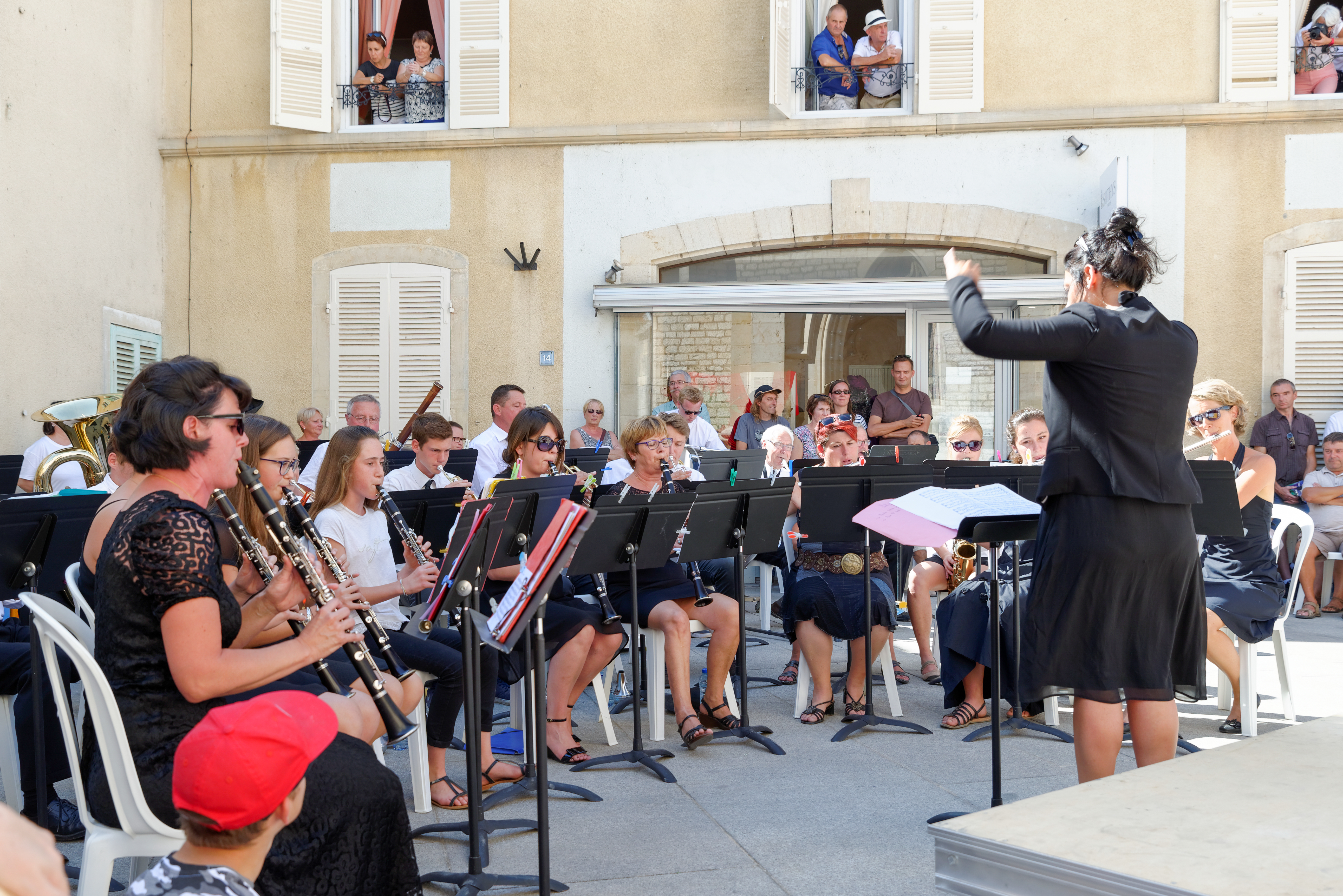 Concert par l’Harmonie de Meursault, en face de l'église, lors du 50ème anniversaire du film La Grande Vadrouille à Meursault (Côte-d'Or, Bourgogne-Franche-Comté, France).